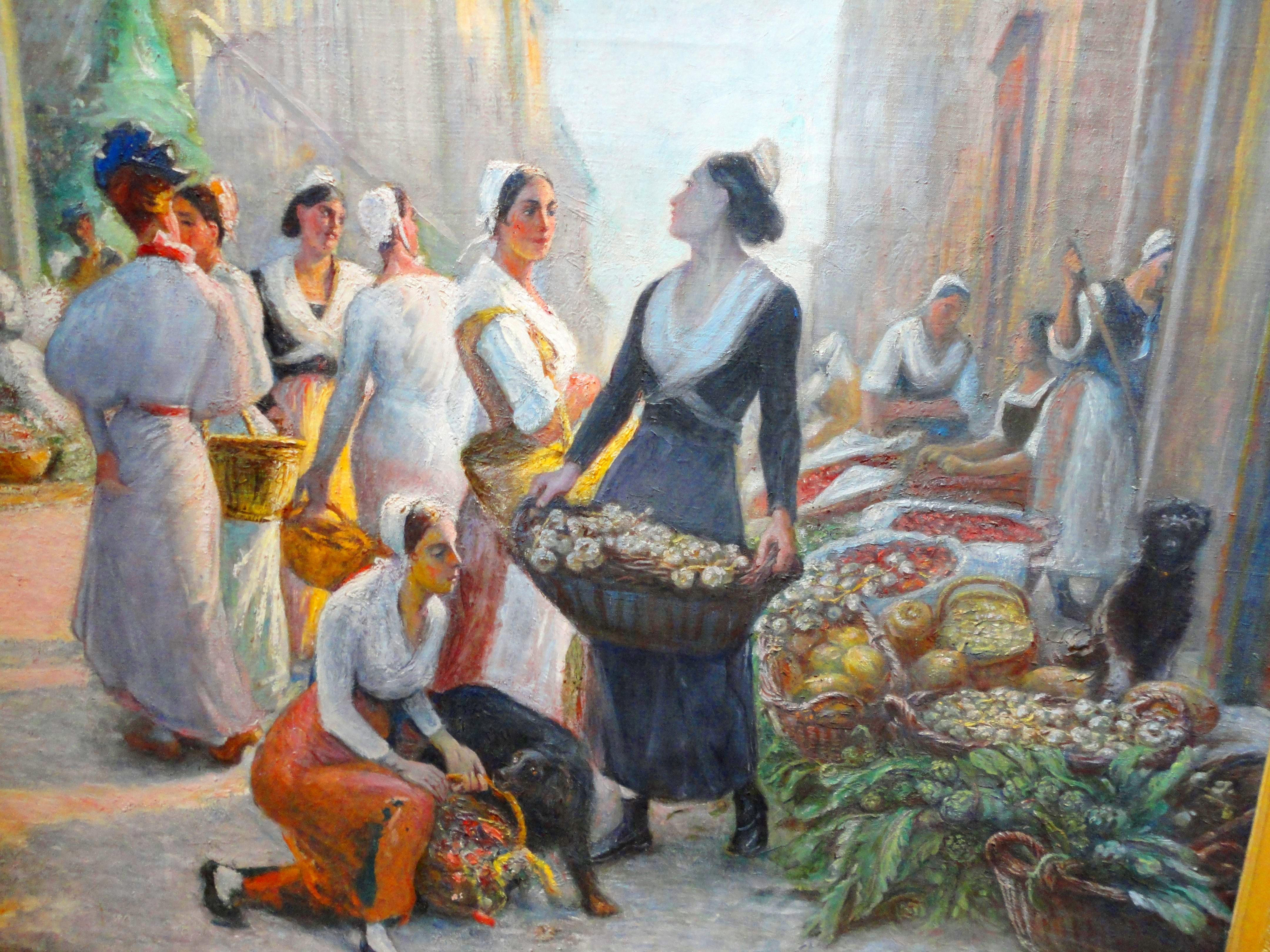 Marché sur la place Pie d'Avignon Atelier de Pierre Grivolas, directeur des Beaux-Arts